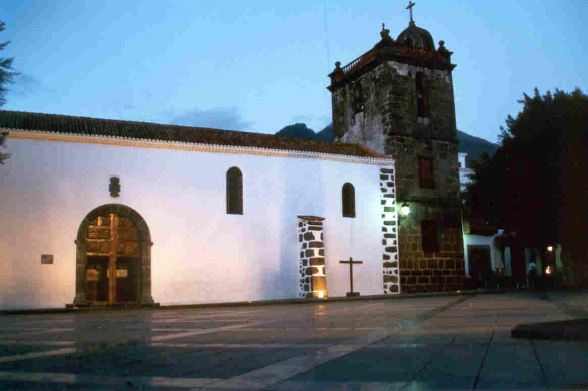 Fotografía nocturna de la plaza España de Los Llanos de Aridane, en la Isla de La Palma (Islas Canarias, España), tomada al anochecer el 22 de diciembre de 1999. Autor: Fev